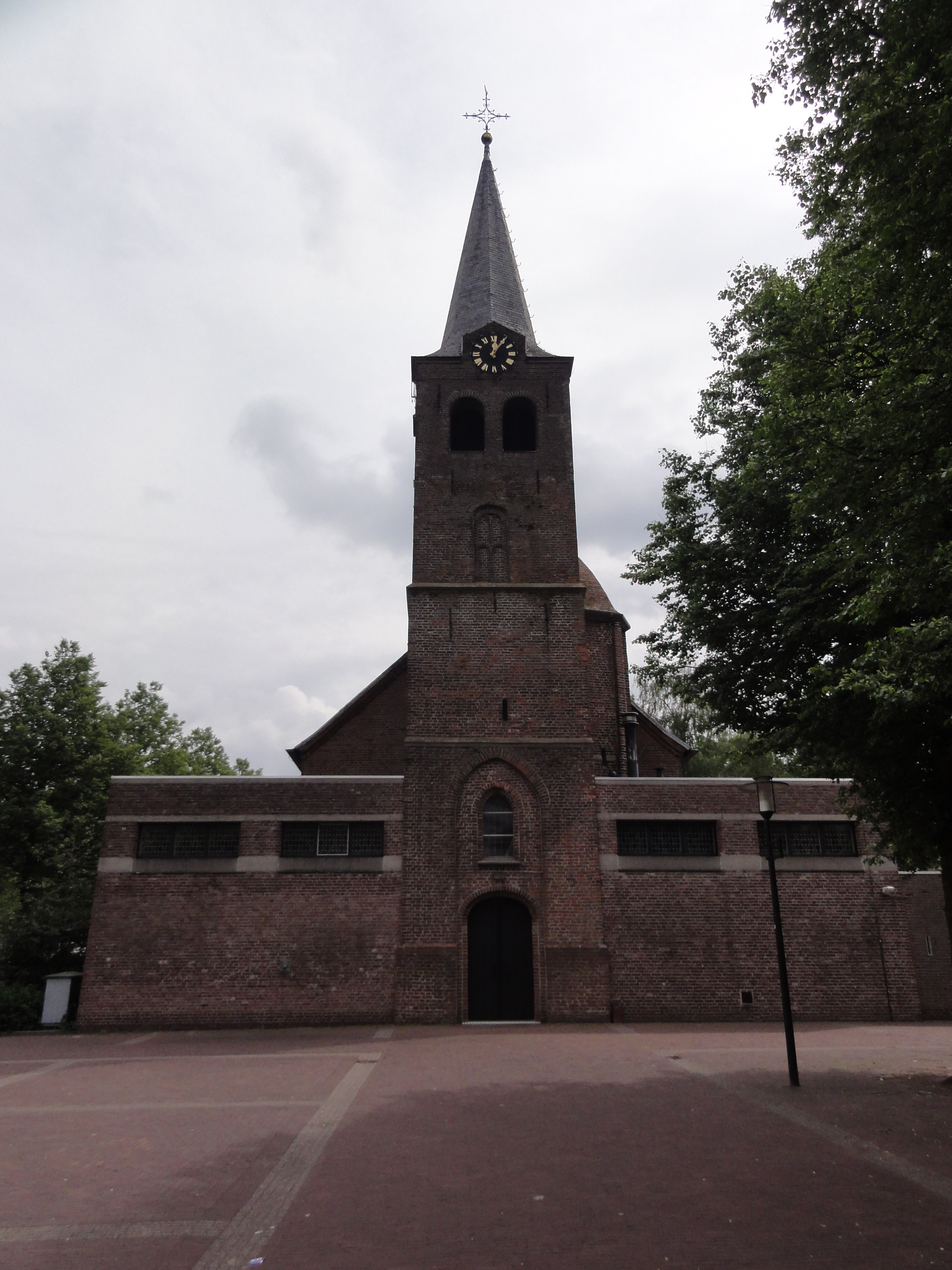 Milheeze (Gemert-Bakel) De basis van de toren stamt uit de XVe eeuw. Toren en kerk gebouwd in 1844/45. Vergroting en modernisering in 1963-64 door architect Jan de Jong